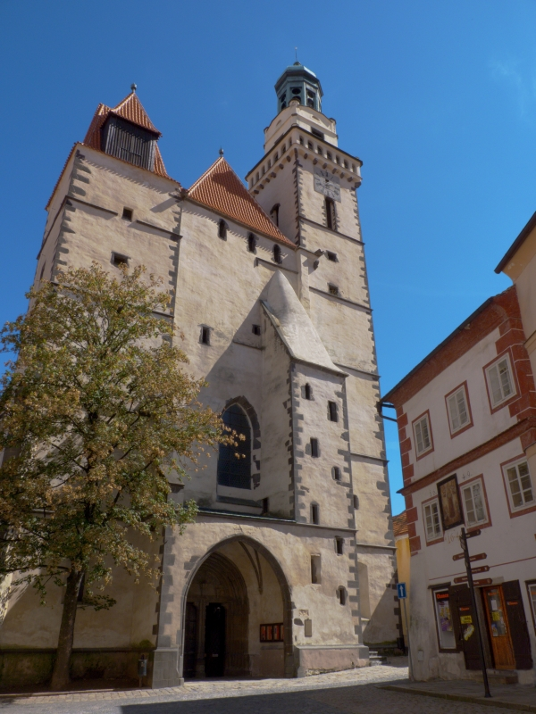 Kostel svatého Jakuba v Prachaticích